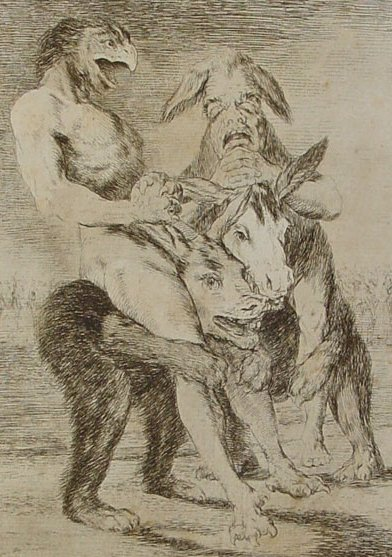 Miren que graves.-Detalle 1 del Capricho nº 63: Francisco Goya y Lucientes, Pintor de Goya, serie Los Caprichos